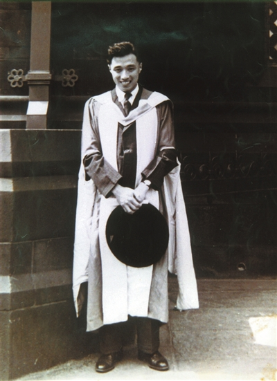 杨南生从曼彻斯特大学获得博士学位